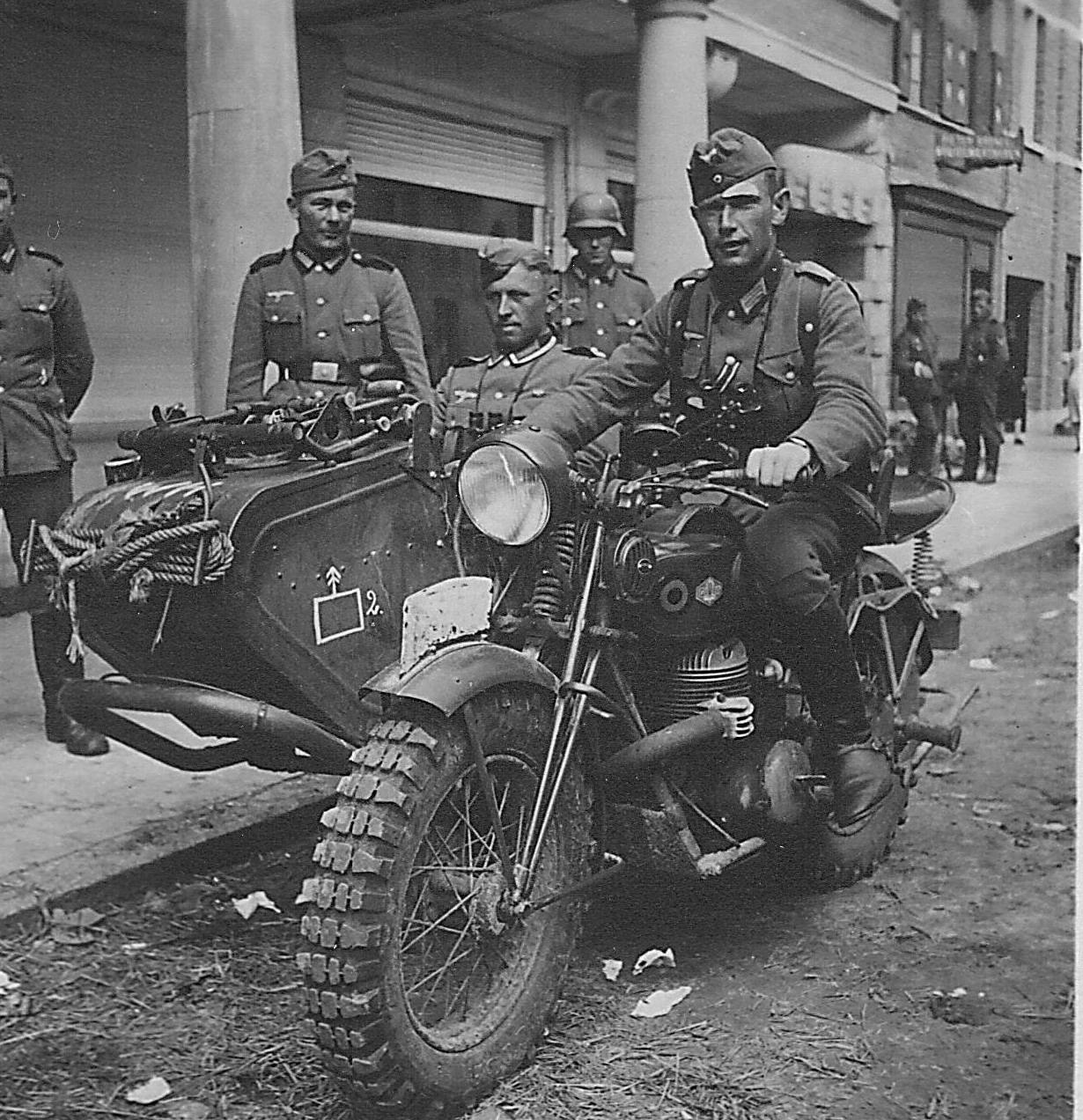 Beutemaschine, Gillet Herstal 720